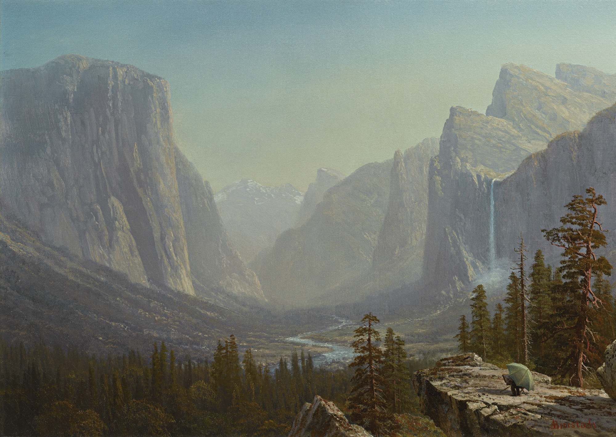 Yosemite